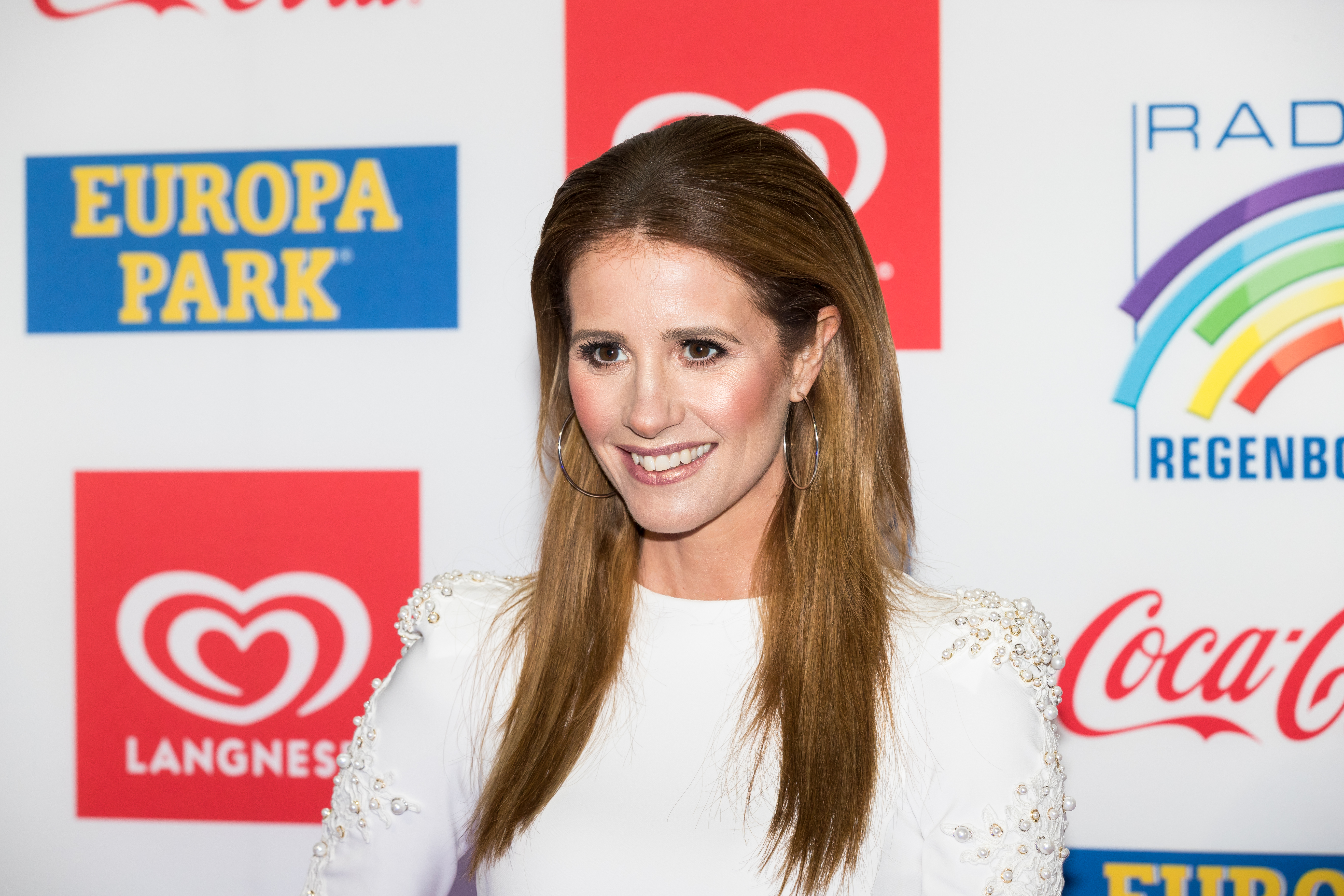 during Radio Regenbogen Award 2018 at Europapark, Rust, Baden-Württemberg, Germany on 2018-03-23, Photo: Sven Mandel